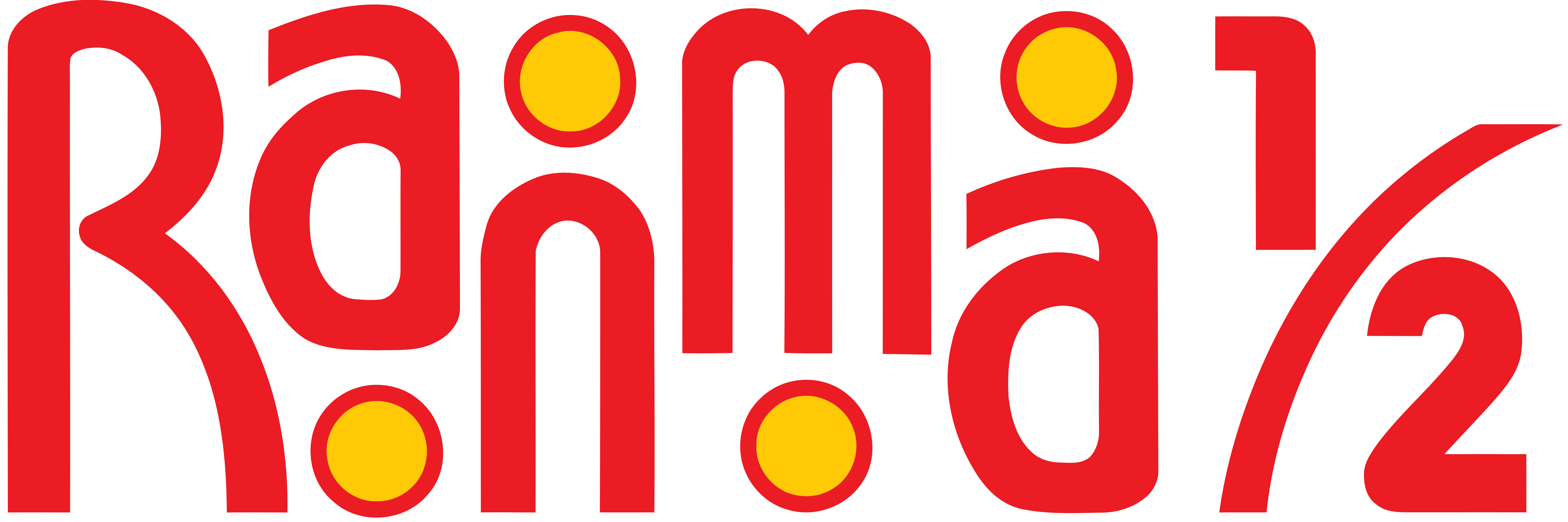 Ranma ½ logo reconstruido en gráficos vectoriales por JBOOK 17.